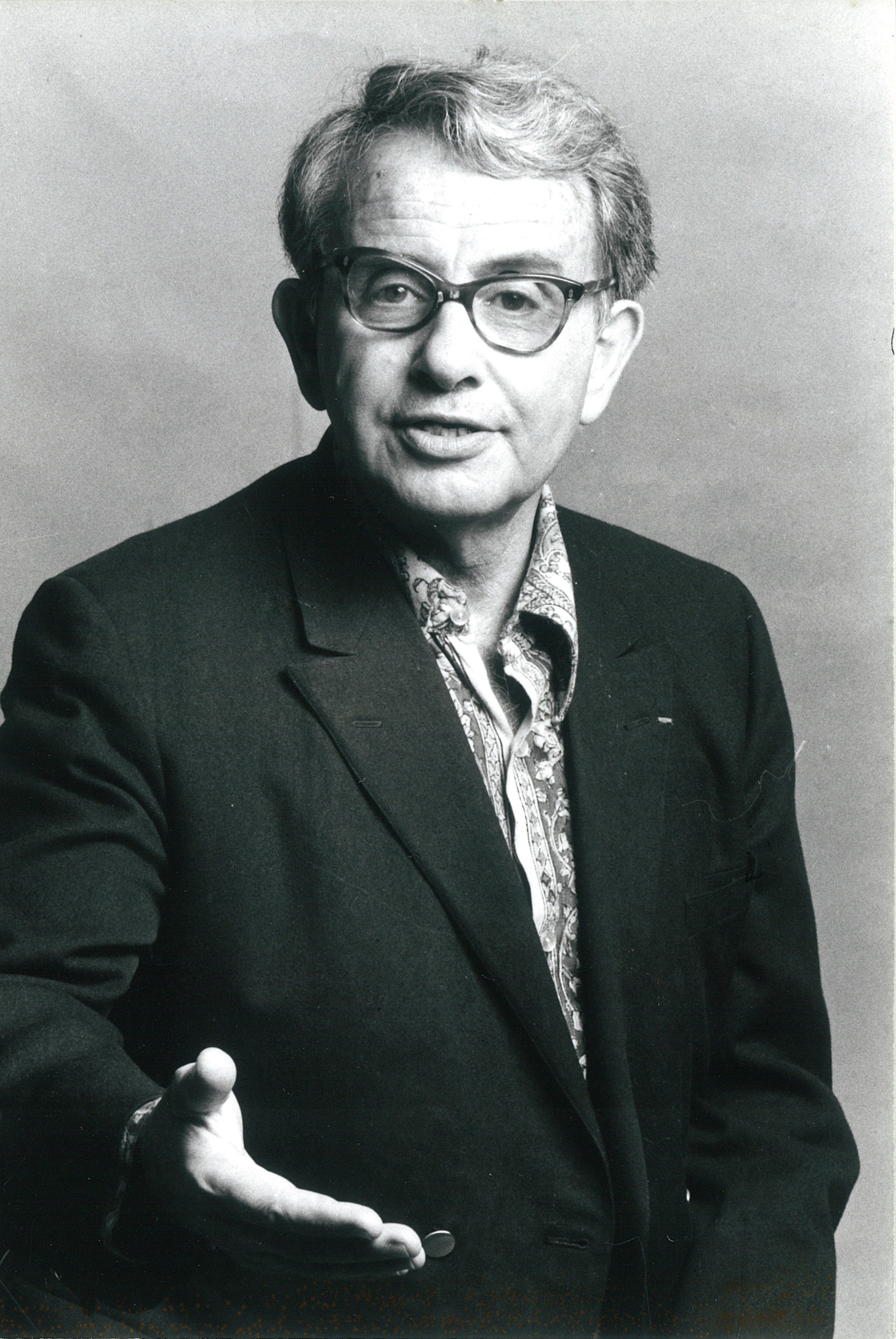 Jacques Canetti dans les années 1960 à Paris